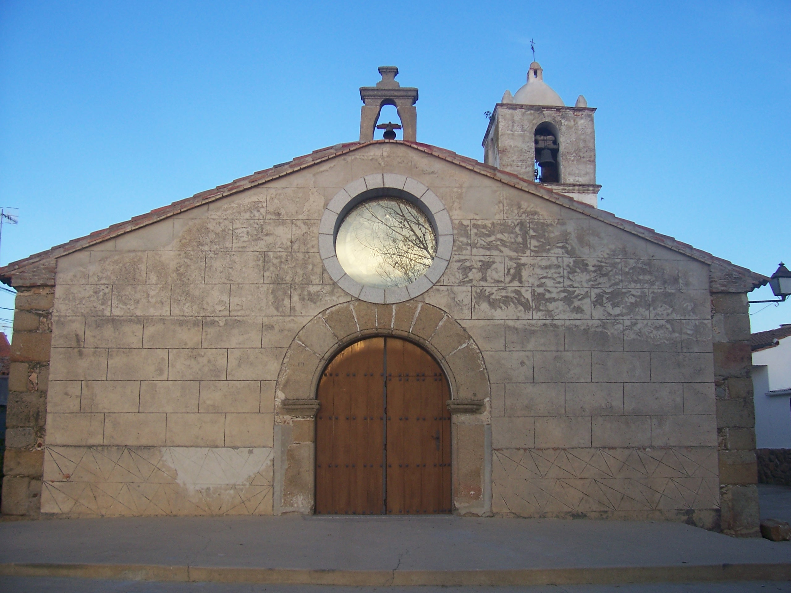 Iglesia Parroquial dedicada a San Blas, en Aldehuela de Jerte, Cáceres, España